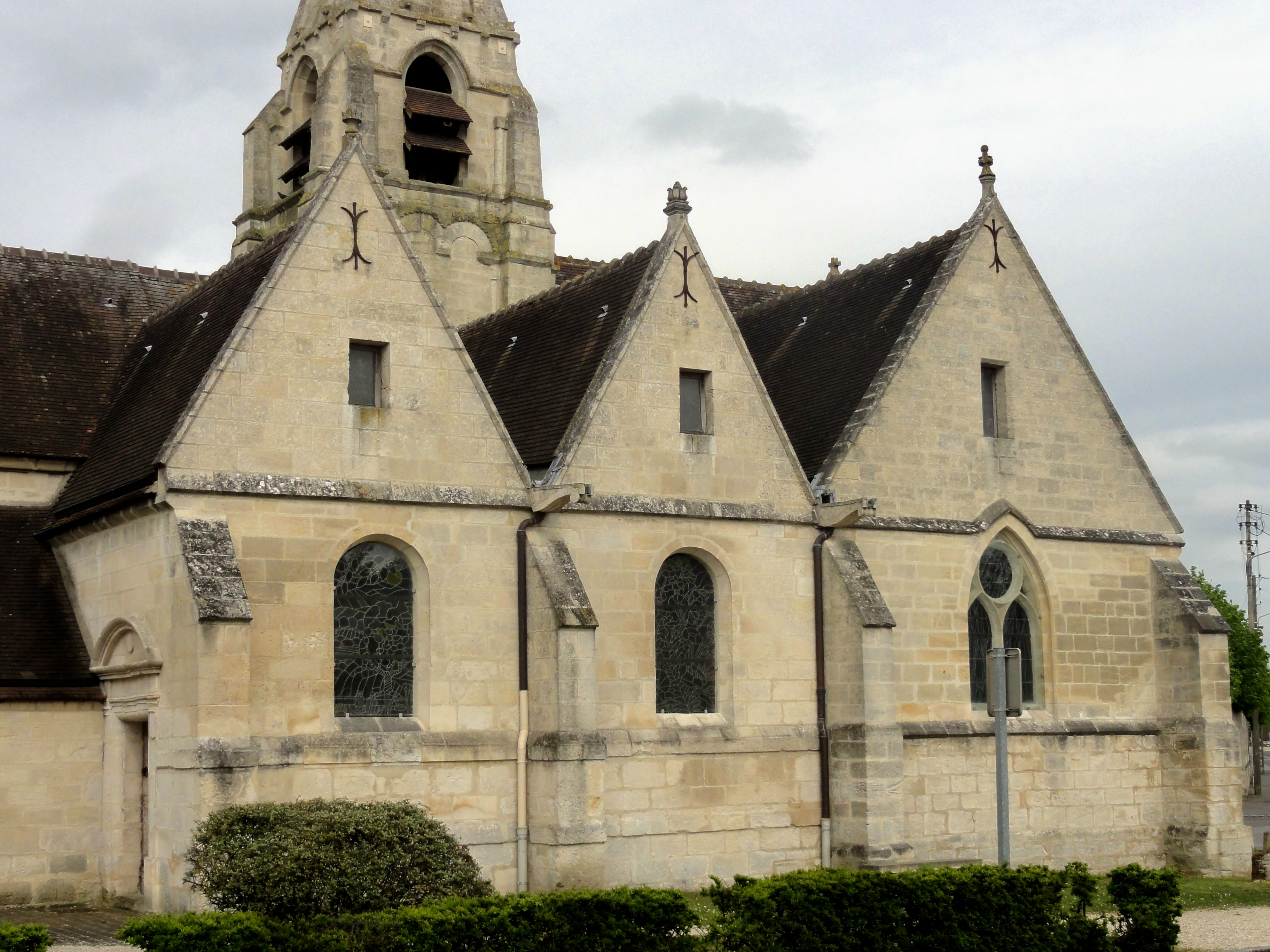 Les trois chapelles du sud. La première s'ouvre sur la nef, la seconde sur la croisée du transept et la dernière sur le chœur, mais seulement par une arcade rélativement étroite.